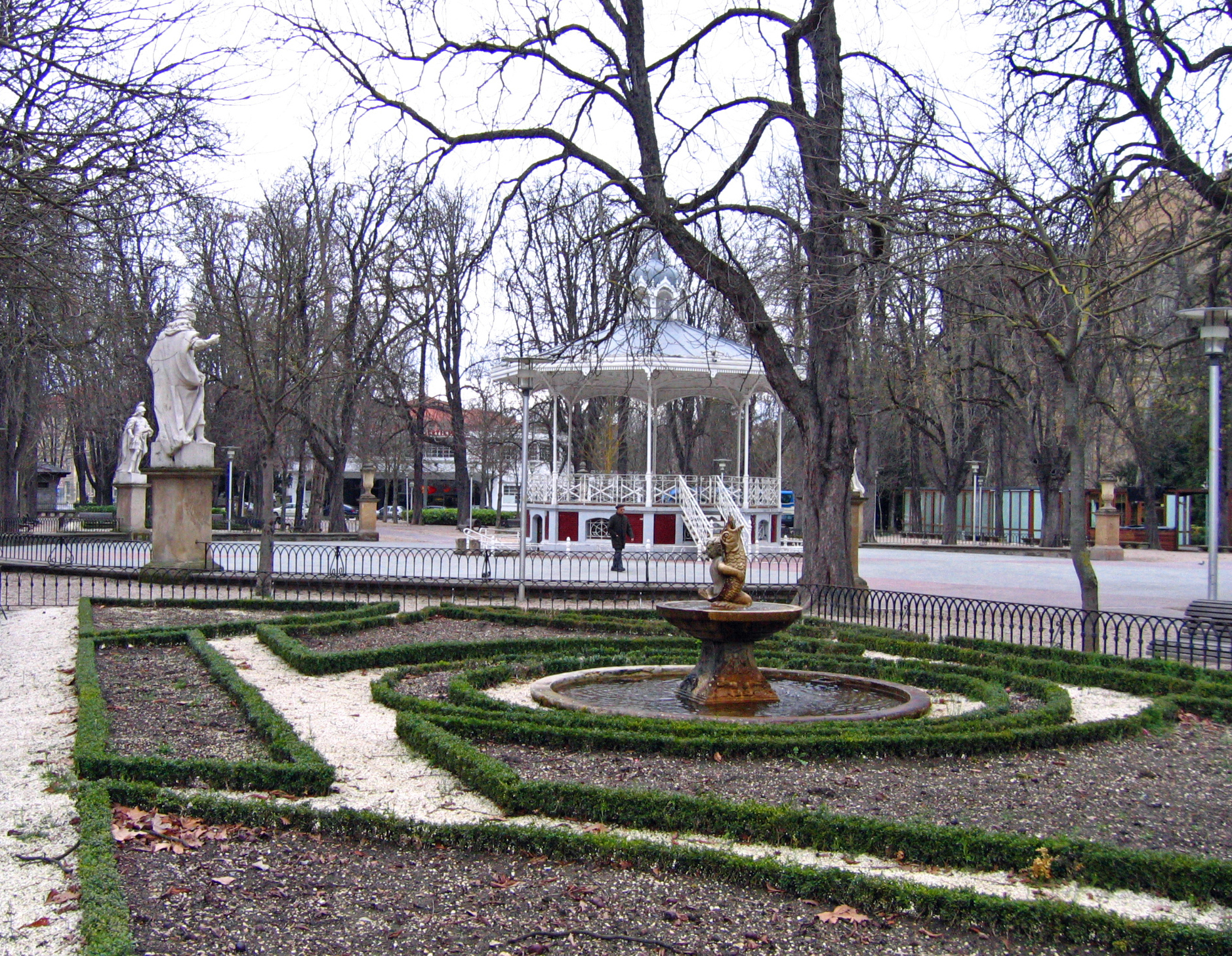 Kiosko de Música en el Parque de La Florida. Vitoria.